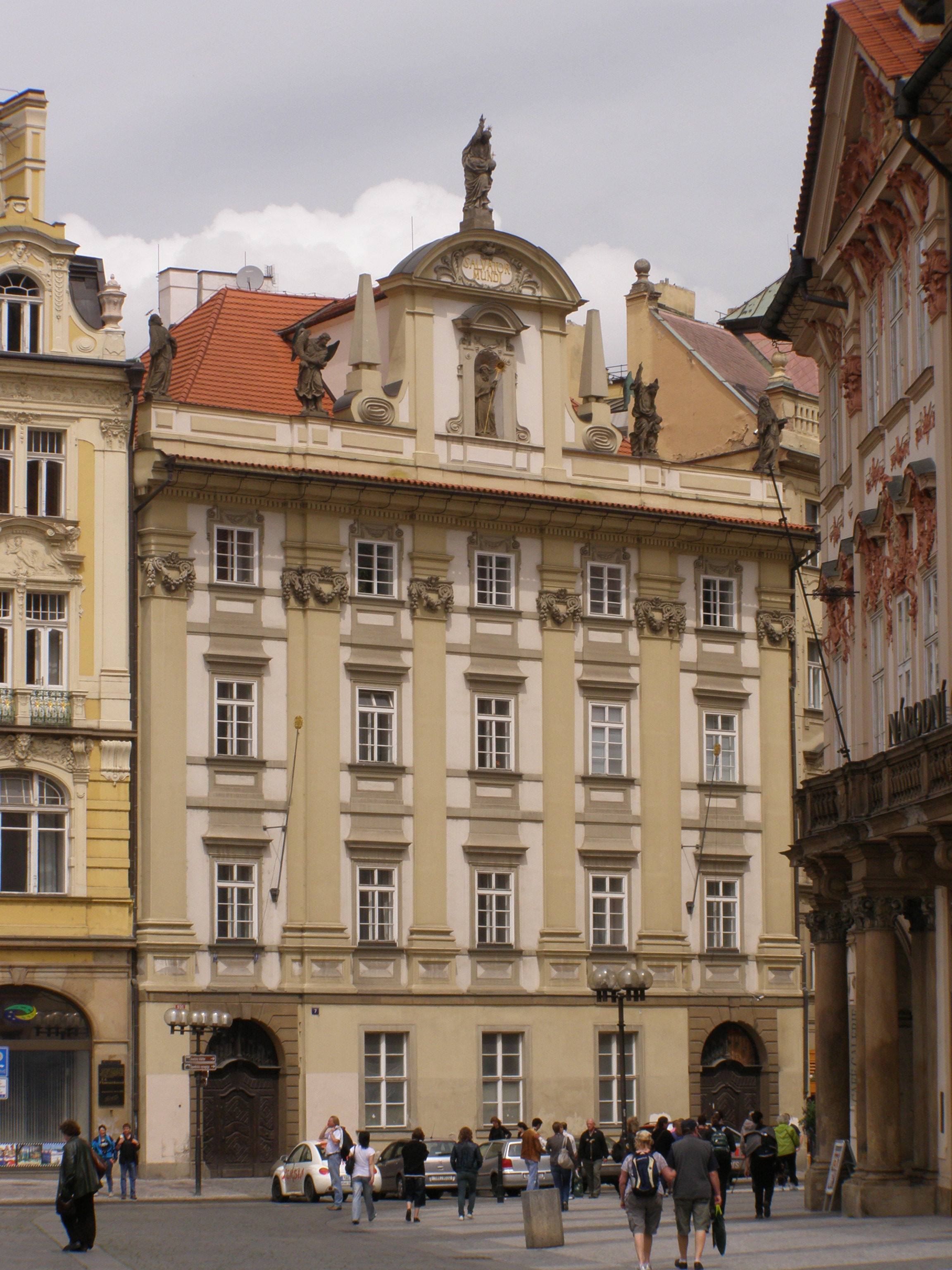 Praha, Staré Město, Staroměstské náměstí, bývalý klášter pavlánů